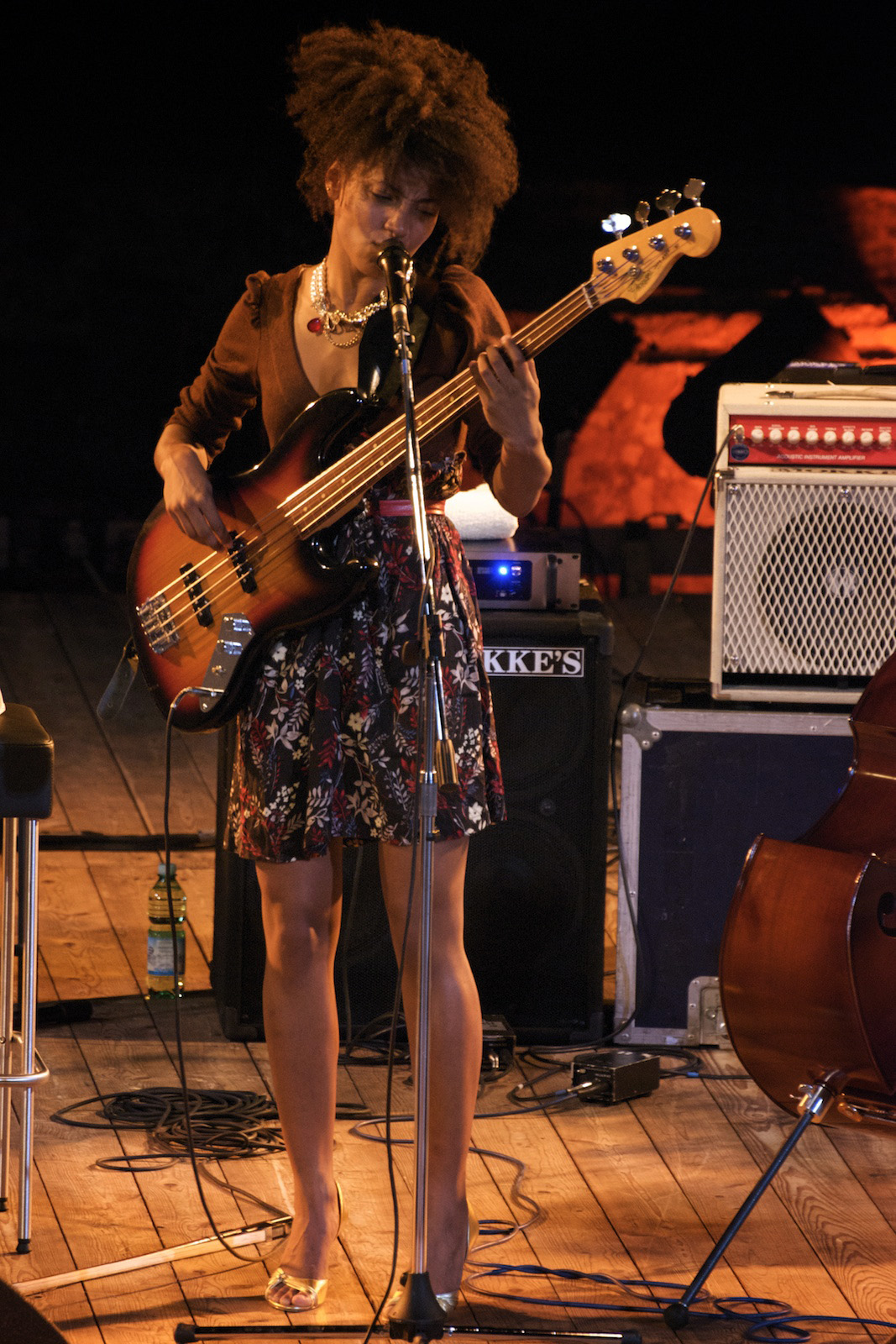 Esperanza Spalding - Concerto del 15 luglio 2009 a Fiesole - Firenze